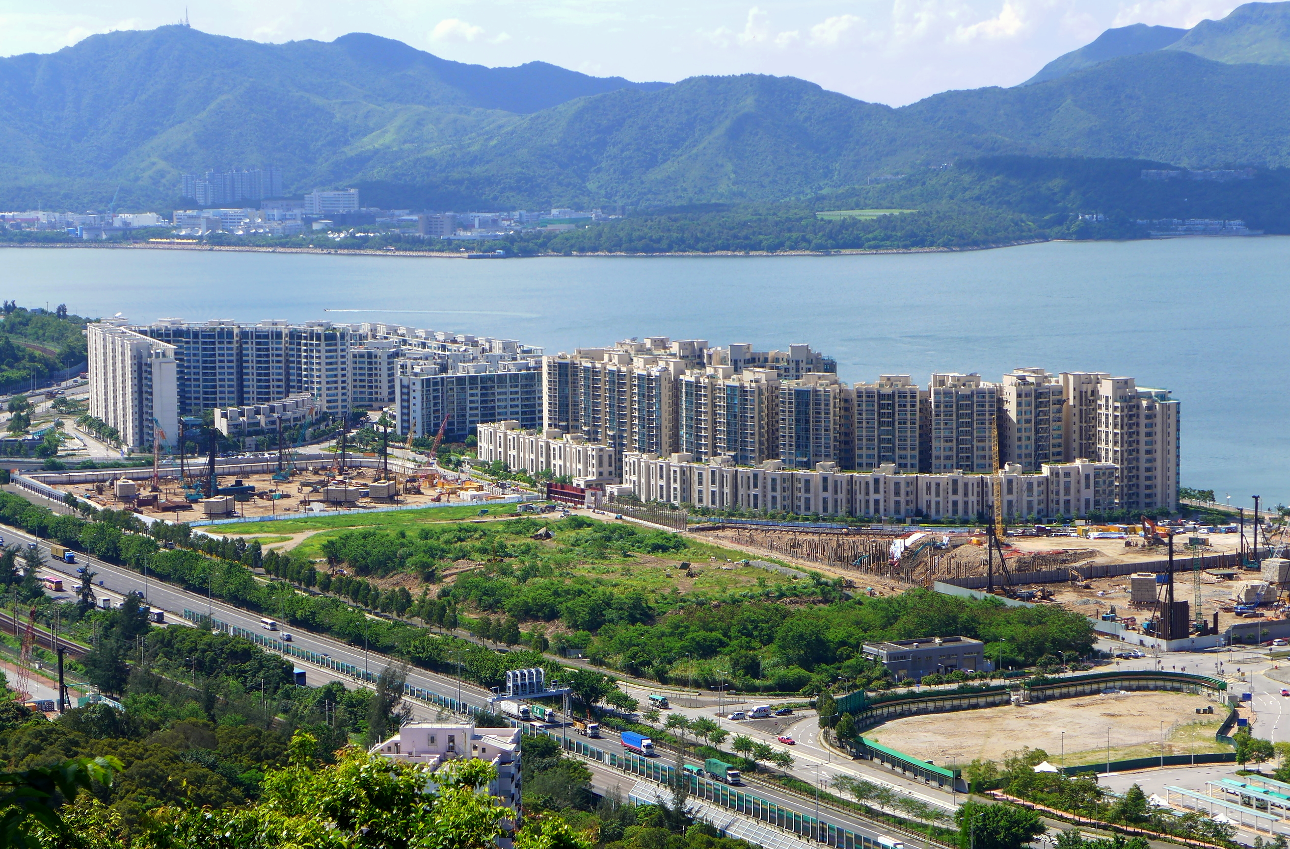 Providence Bay